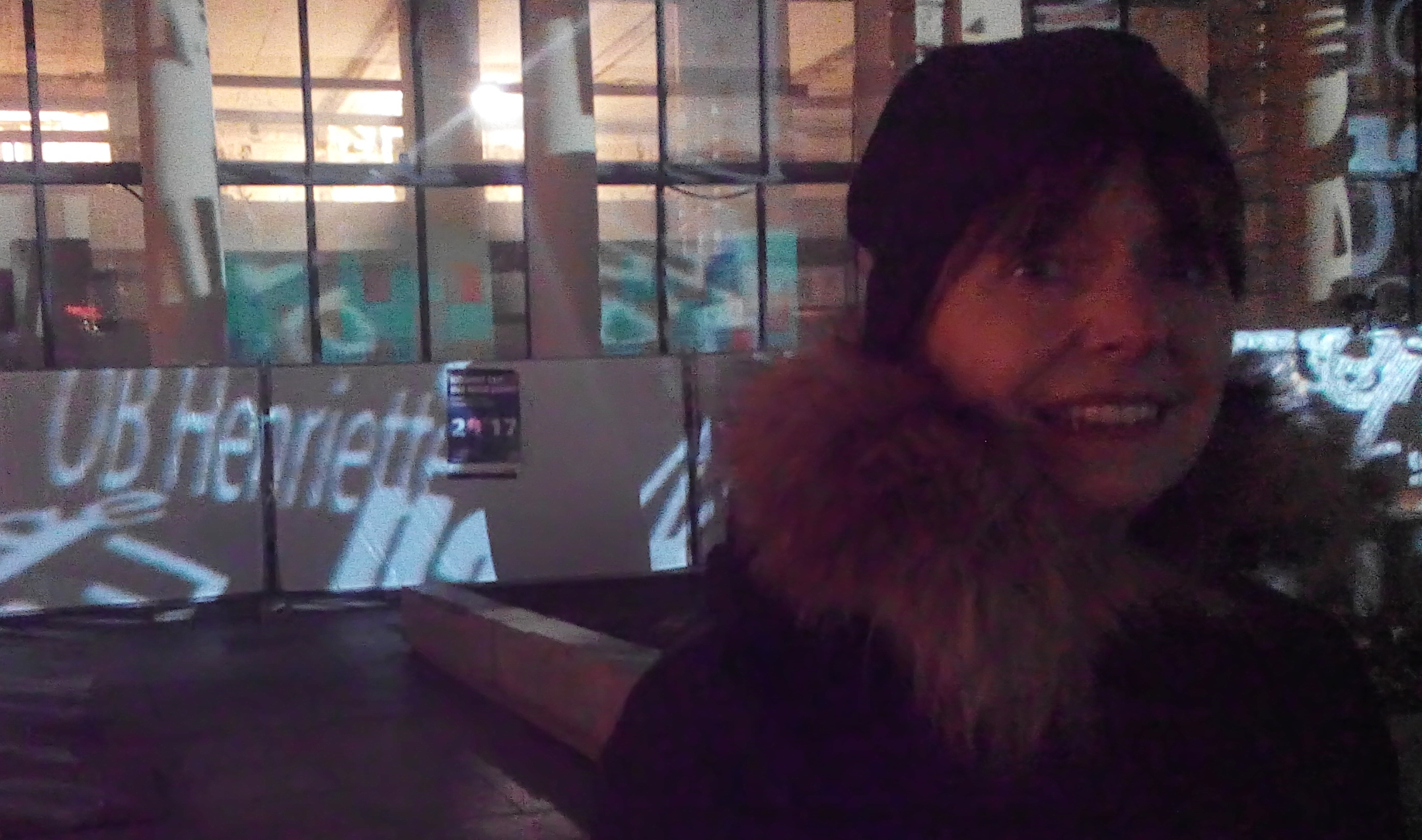 Portrait vor dem Namenszug der Lichtshow